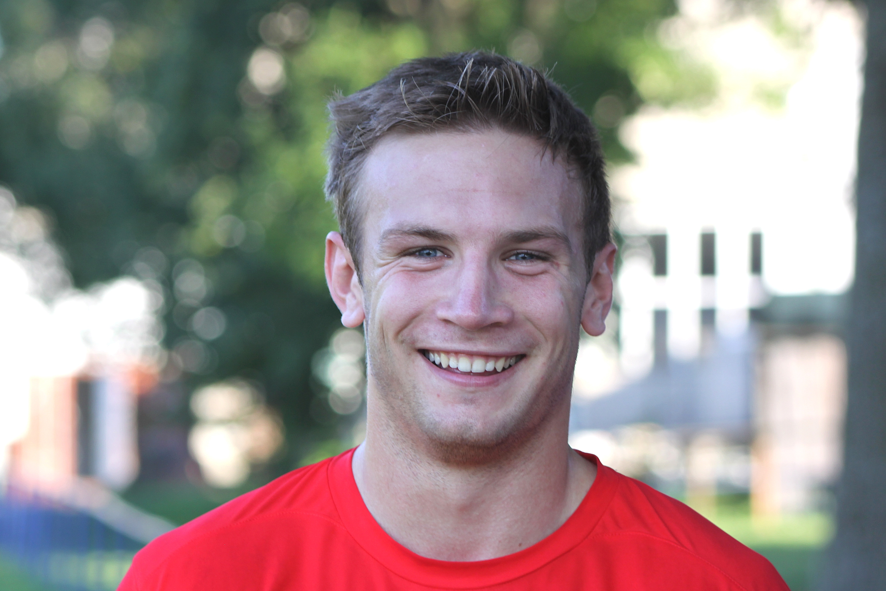 Andreas Weimann (Aston Villa) - Österreichische U-21-Fußballnationalmannschaft (2)